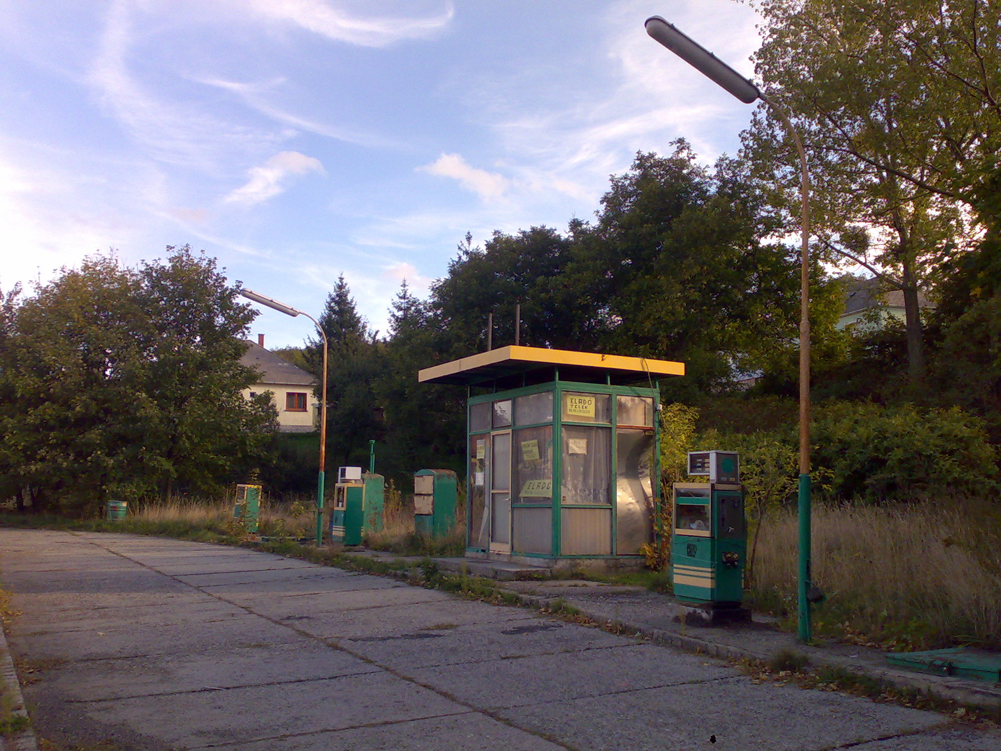 Elhagyatott benzinkút